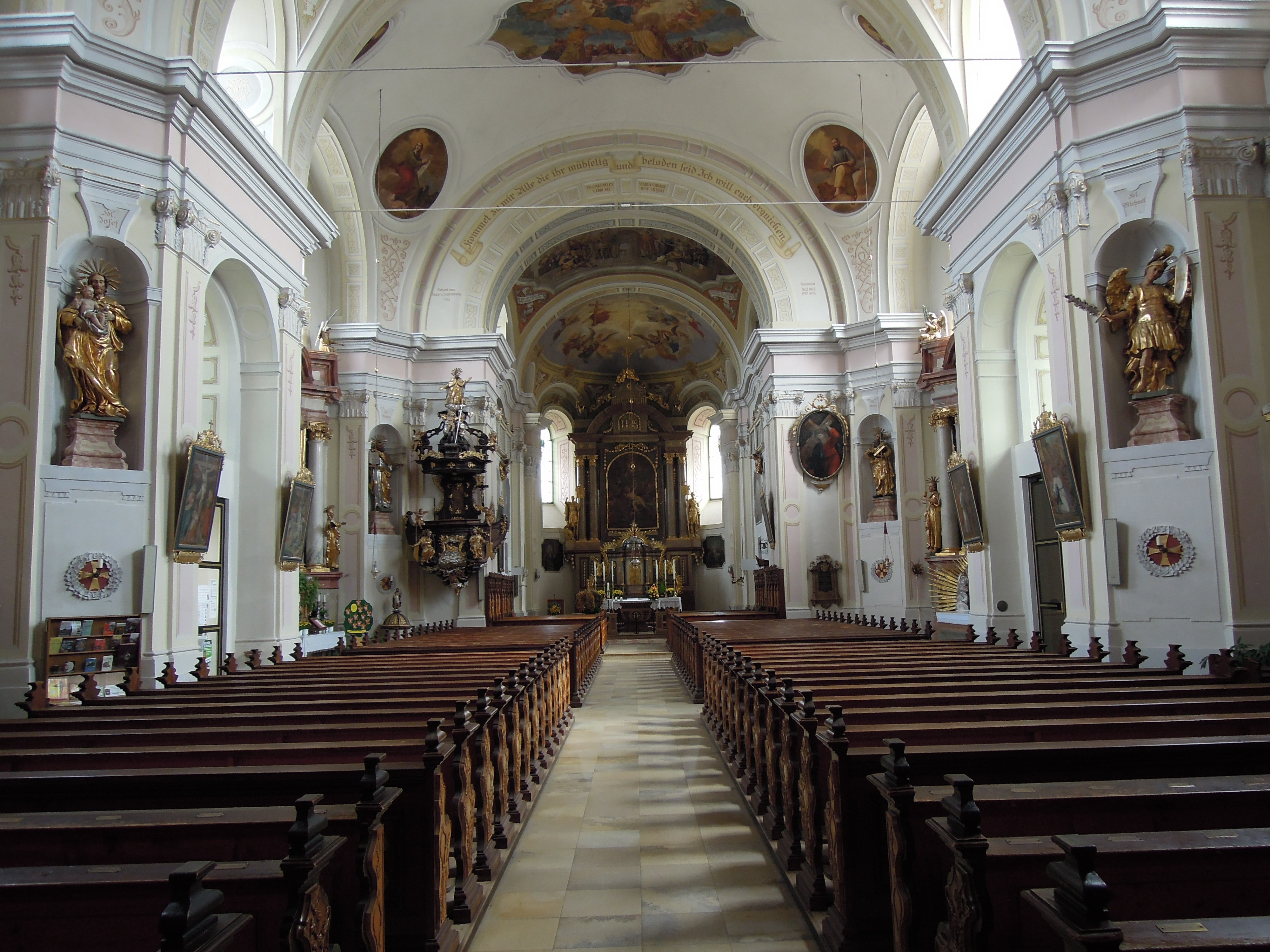 Kath. Pfarrkirche hl. Laurentius; Blick in das Kirchenschiff